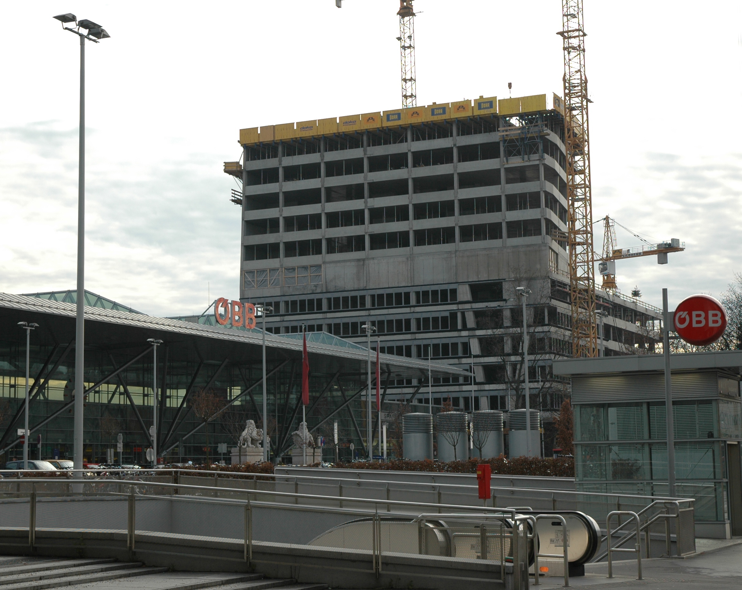 Das von der ÖBB errichtete, bei Fertigstellung 99 Meter hoch sein werdende, Bürogebäude "Terminal Tower" am Linzer Hauptbahnhof in der Bauphase.